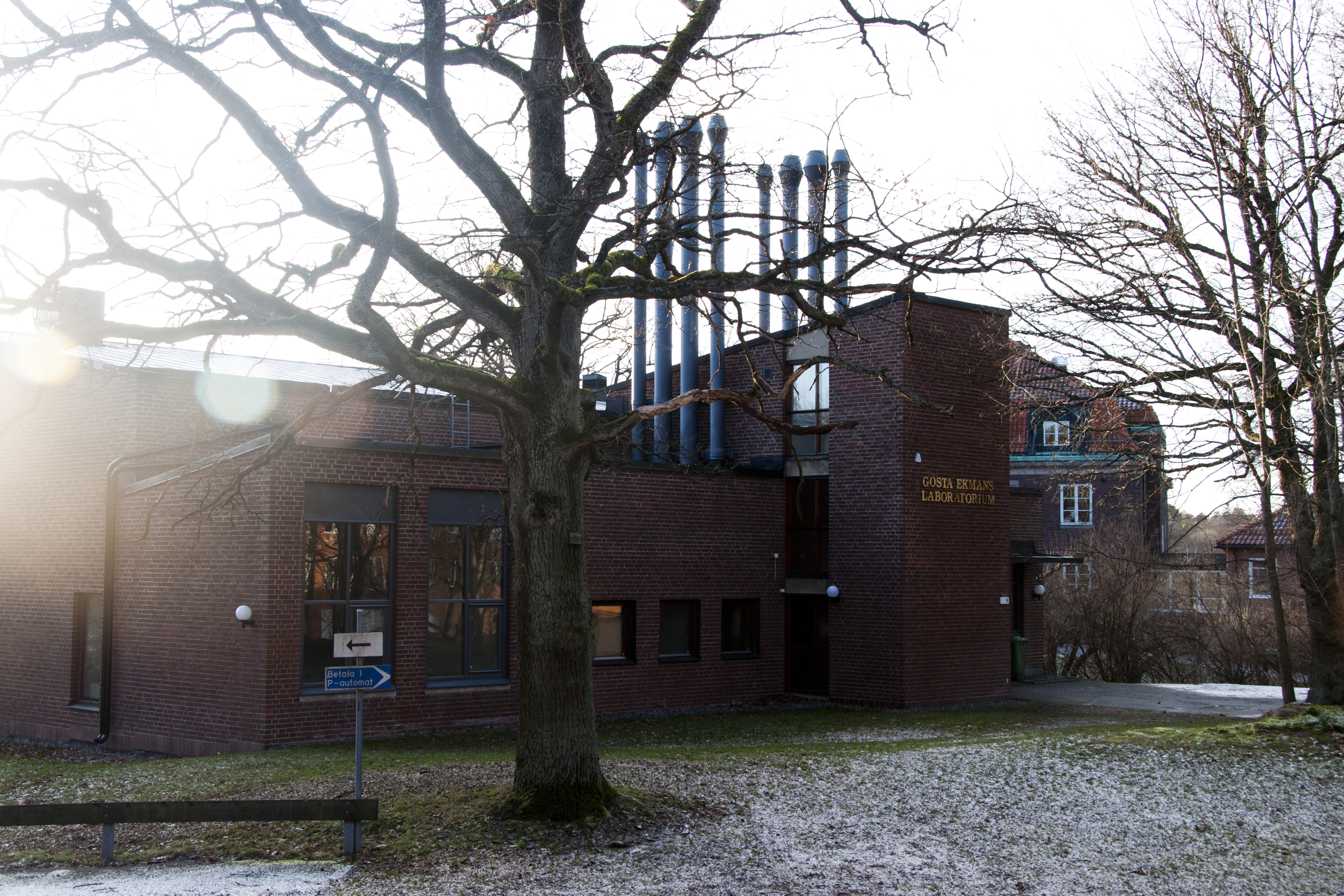 Gösta Ekmans Laboratorium. Tidigare fytotrombyggnad uppförd 1965. Ombyggnade 1996